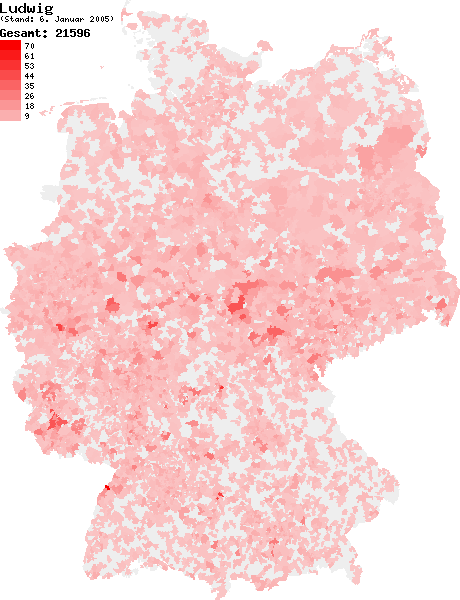 Verteilung des Nachnamens Ludwig in Deutschland nach dem Telefonbuch mit Stand vom 6. Januar 2005